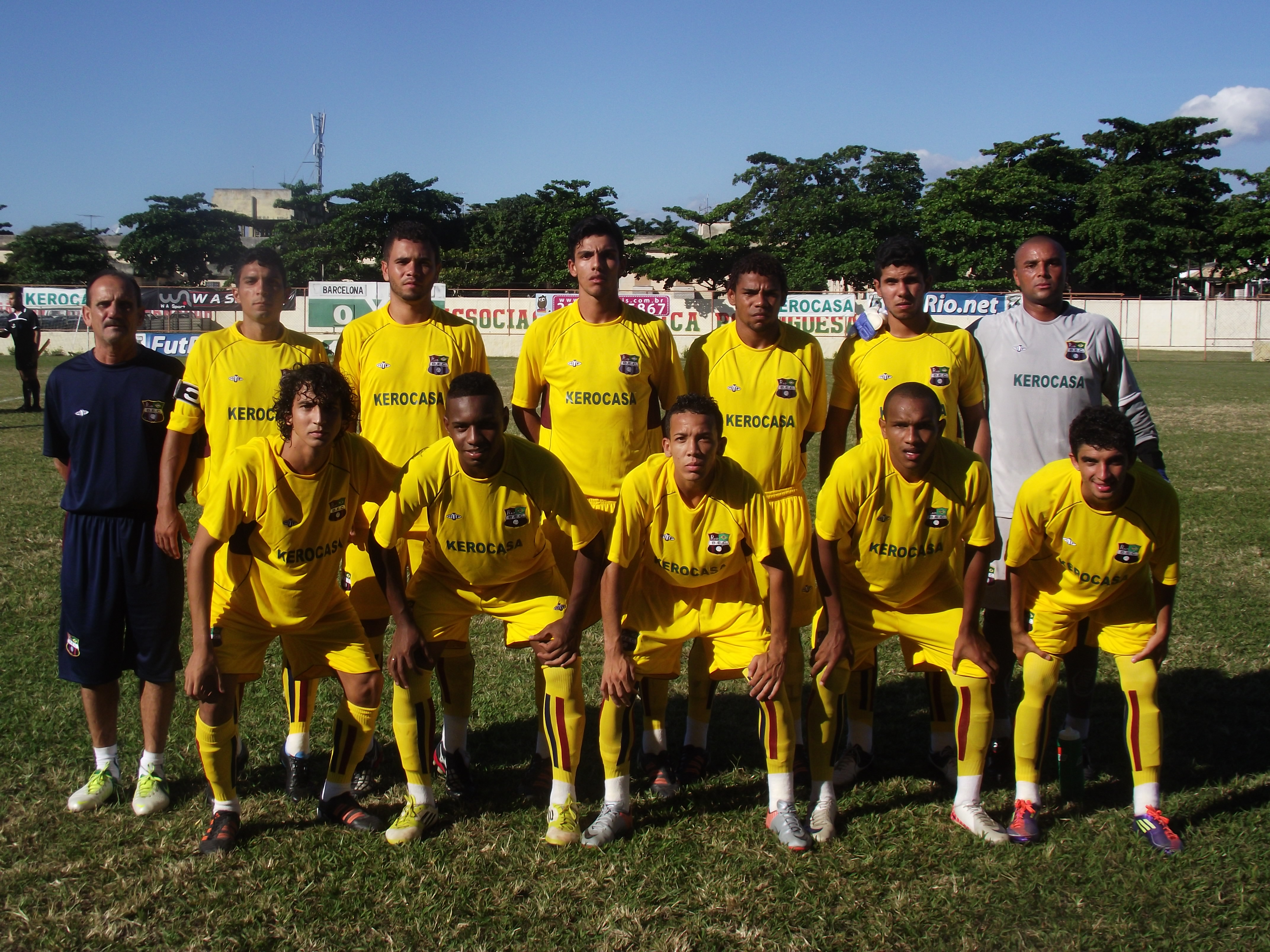 Equipe profissional do Barcelona, do Rio de Janeiro, em 2013